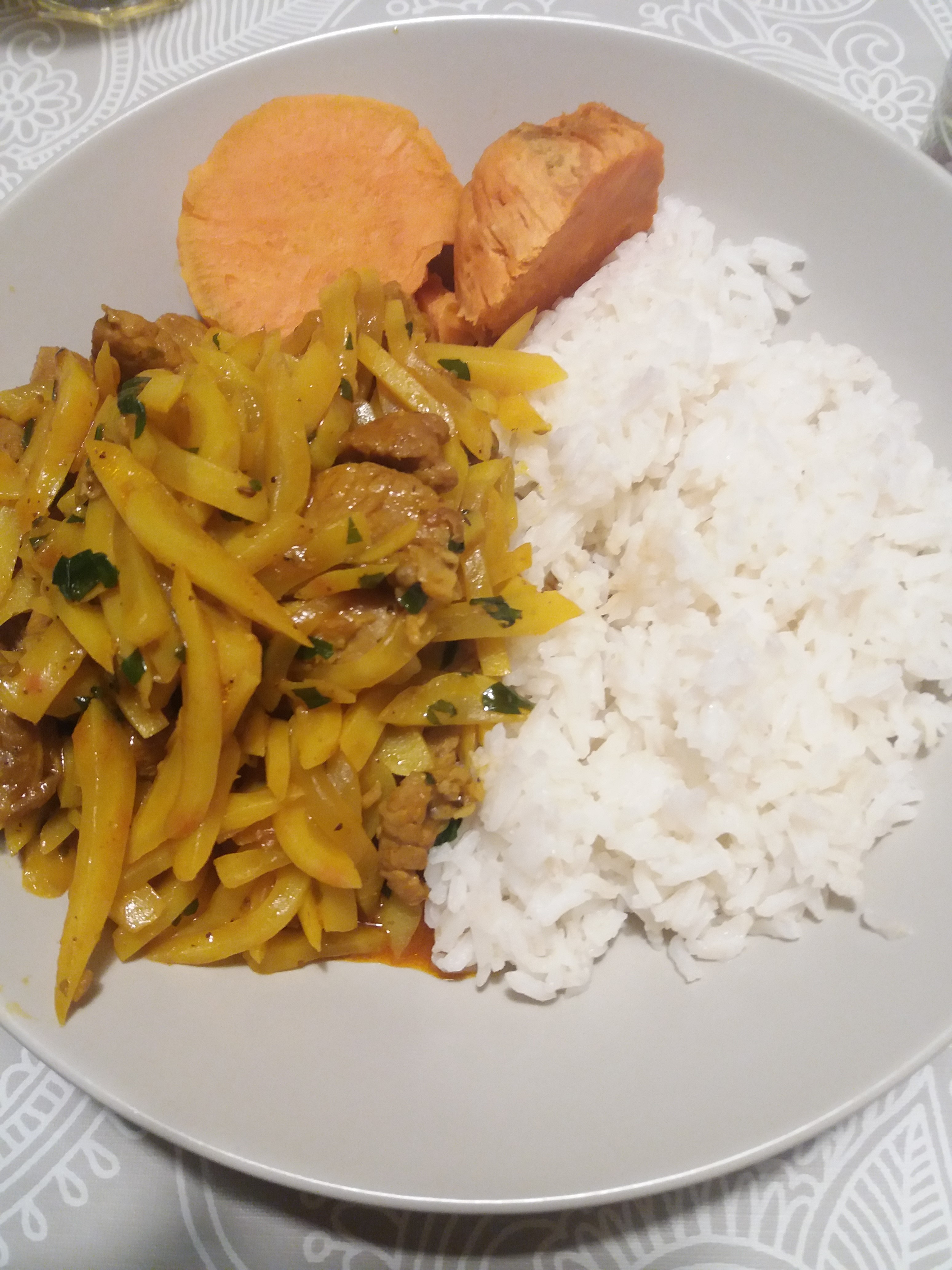 Guiso de ollucos con camote y arroz blanco